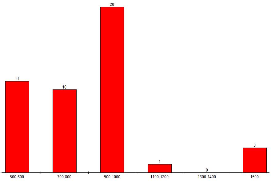 J'ai fait ce graphique en me basant sur les chiffres de arrêtés au 1er janvier 2009.